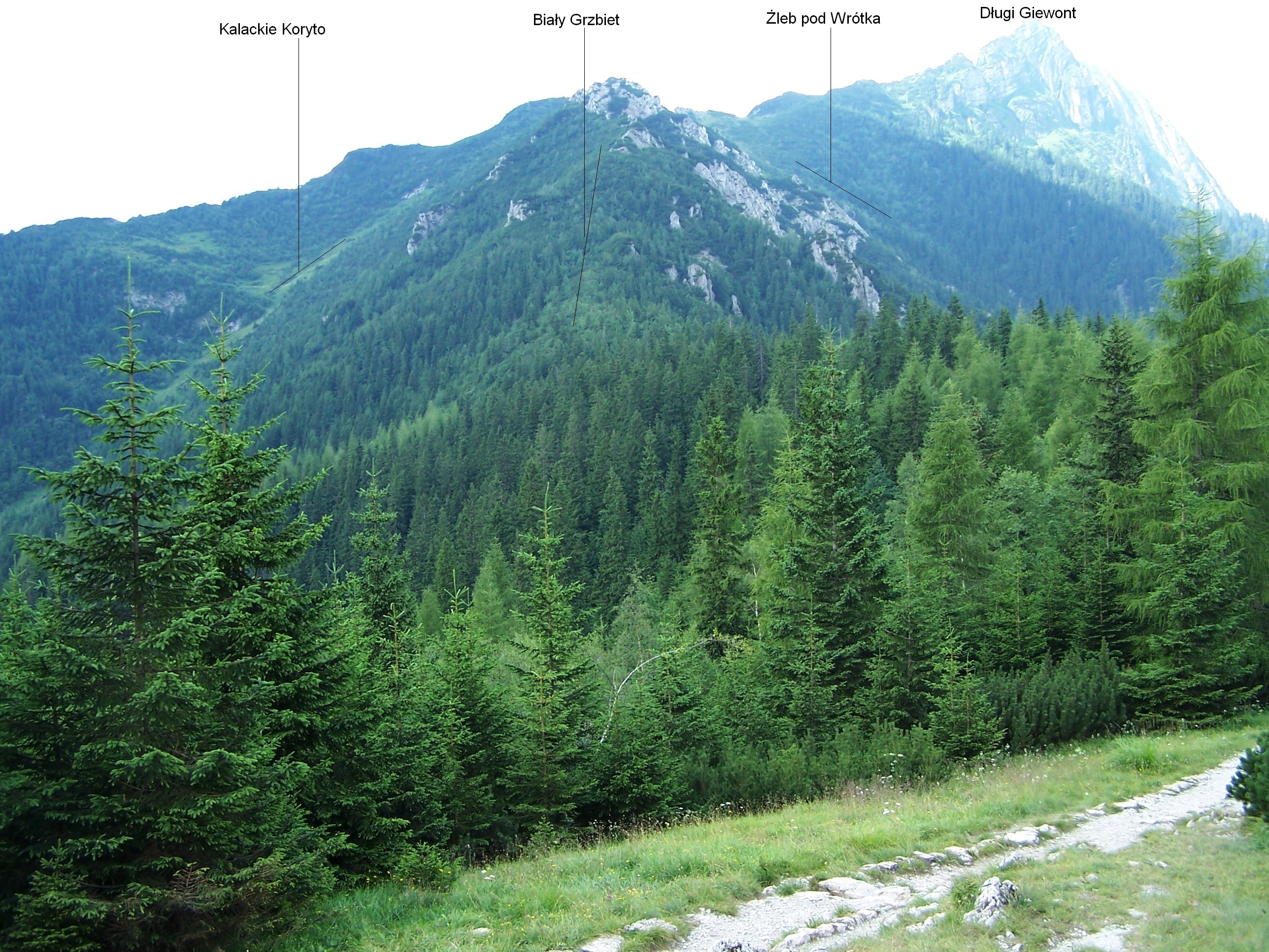 Widok ze ścieżki nad Reglami (z okolic Przełęczy Białego)